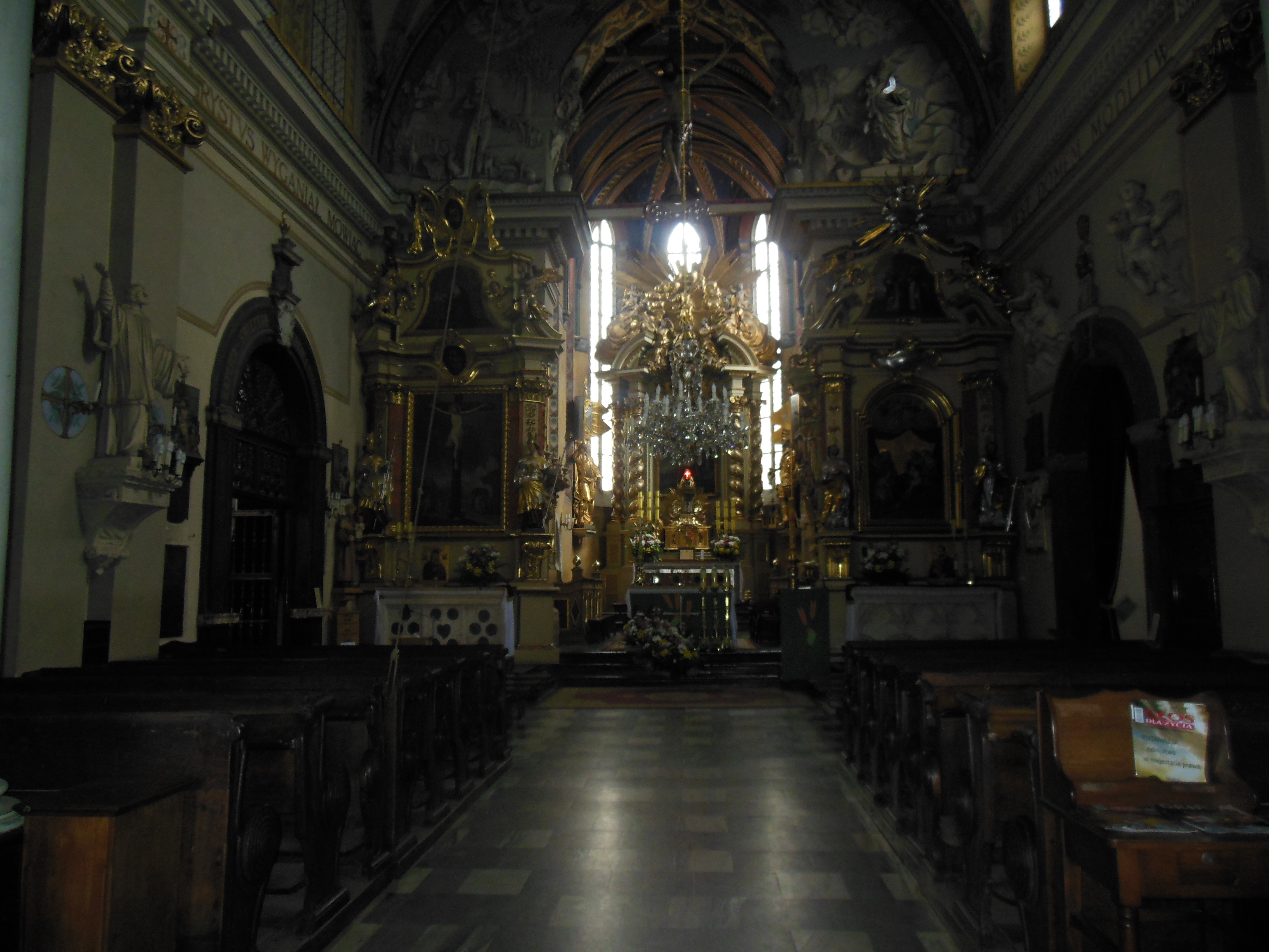 Wnętrze Kościoła św. 10000 Męczenników w Niepołomicach.